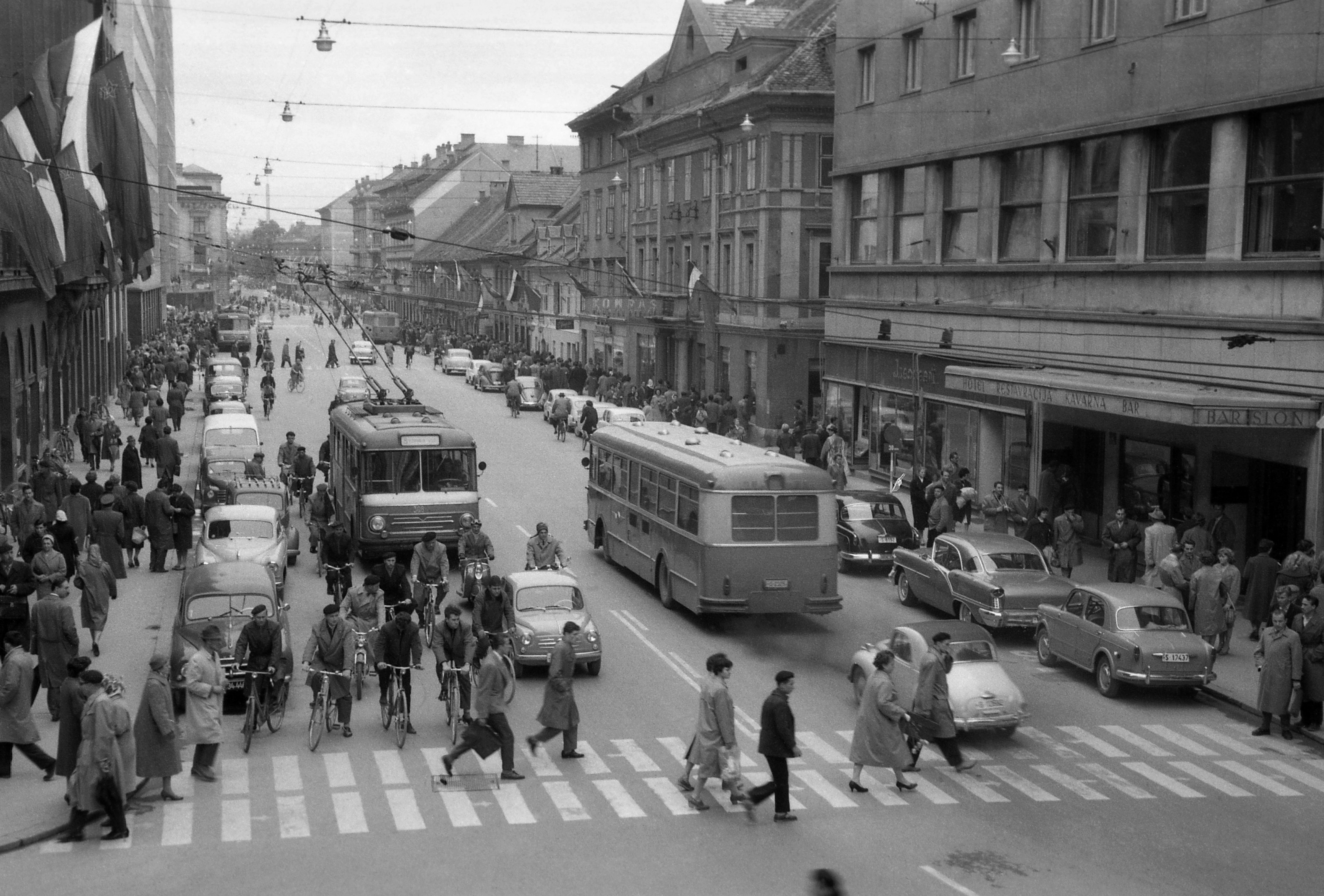 Živahen mestni direndaj na Titovi (danes Slovenski cesti) pred Hotelom Slon. Leto 1960. Foto: Lojze Jerala, iz zbirke časopisa Delo.